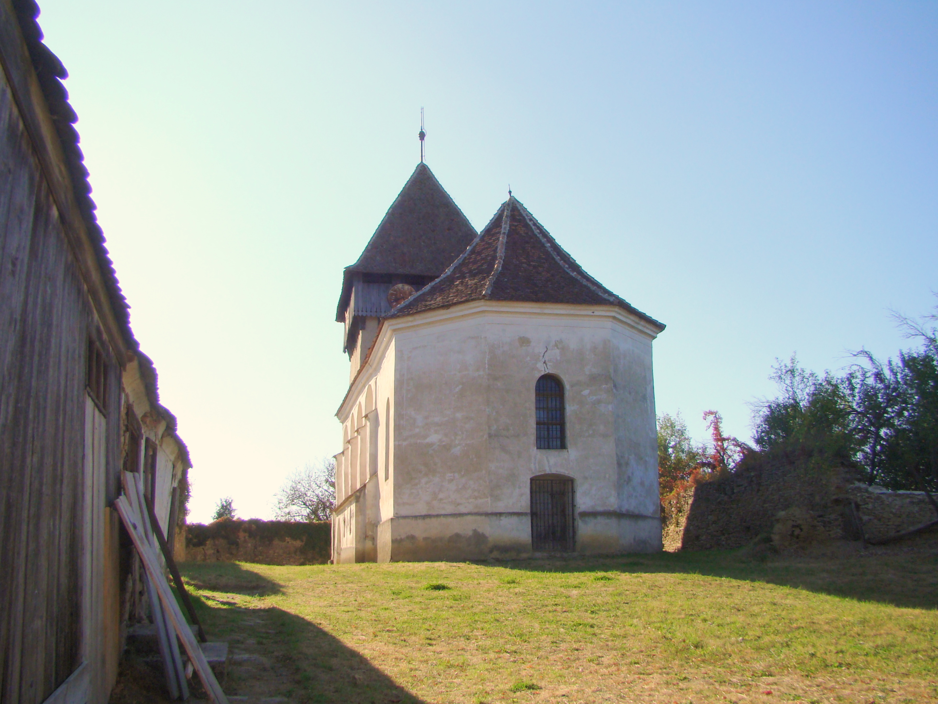 Biserica evanghelică, sat Rodbav; comuna Șoarș 115 sec. XIII-XIX